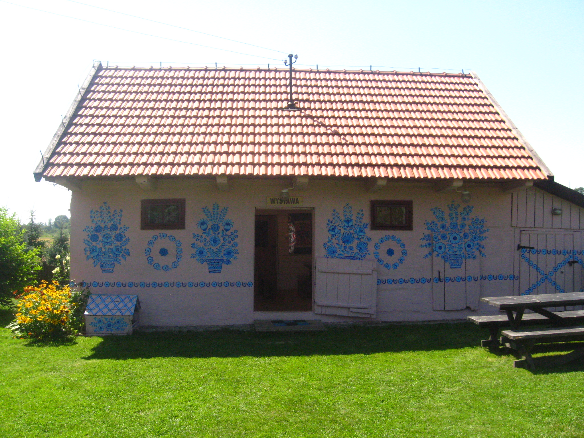 Zalipie